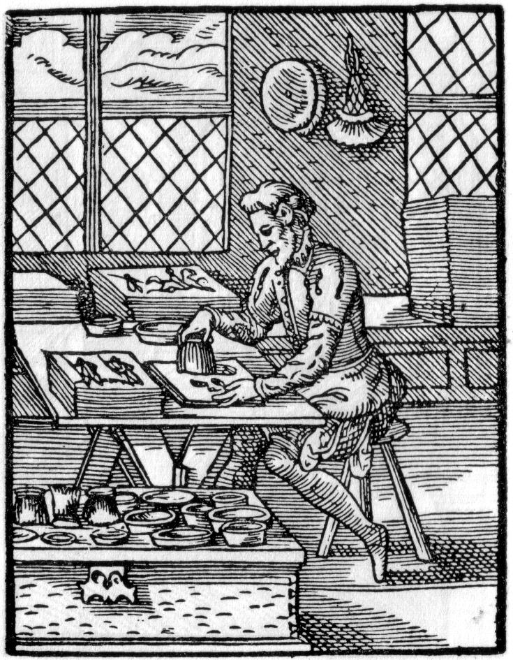 Der Brieffmaler Holzschnitt aus: Jost Amman (1539–1591): Eygentliche Beschreibung aller Stände auff Erden hoher und nidriger, geistlicher und weltlicher, aller Künsten, Handwerken und Händeln ... (erstmals Frankfurt am Main 1568; auch bekannt als: Das Ständebuch) Im Buch wird das Bild von folgendem Text von Hans Sachs begleitet: Ein Brieffmaler bin aber ich, Mit dem Pensel so nehr ich mich, Anstreich die bildwerck so da stehnd, Auff Papyr oder Pergament, Mit farben, und verhöchs mit gold, Den Patronen bin ich nit hold, Darmit man schlechte arbeit macht, Darvon auch gringen lohn empfacht. (Anmerkungen: Brieffmaler = Illustrator; verhöchs = veredele es; Patronen = Schablonen, empfacht = empfängt)